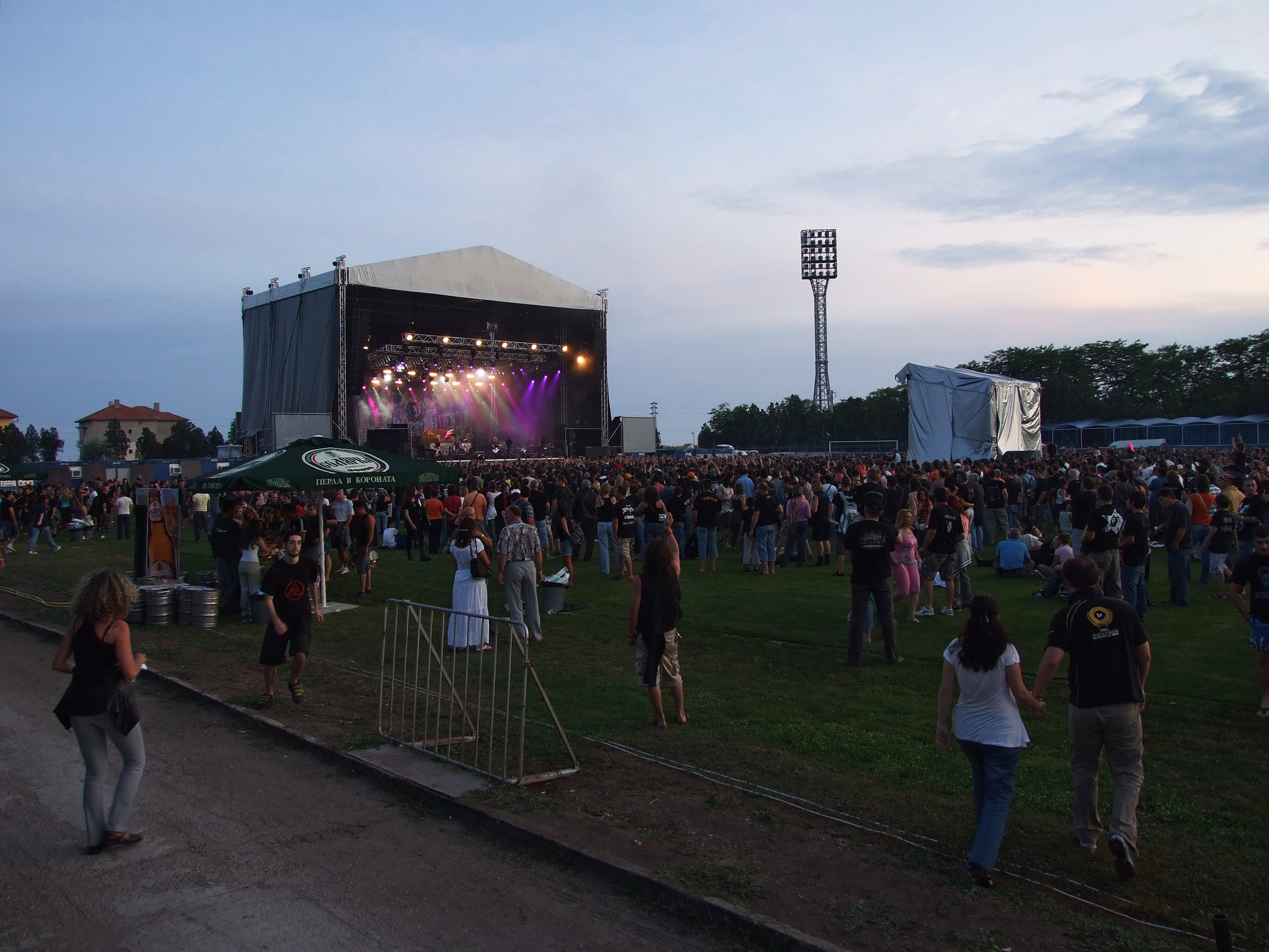 Edguy at Kavarna Rock Fest - 2 July 2009 - Kavarna, Bulgaria